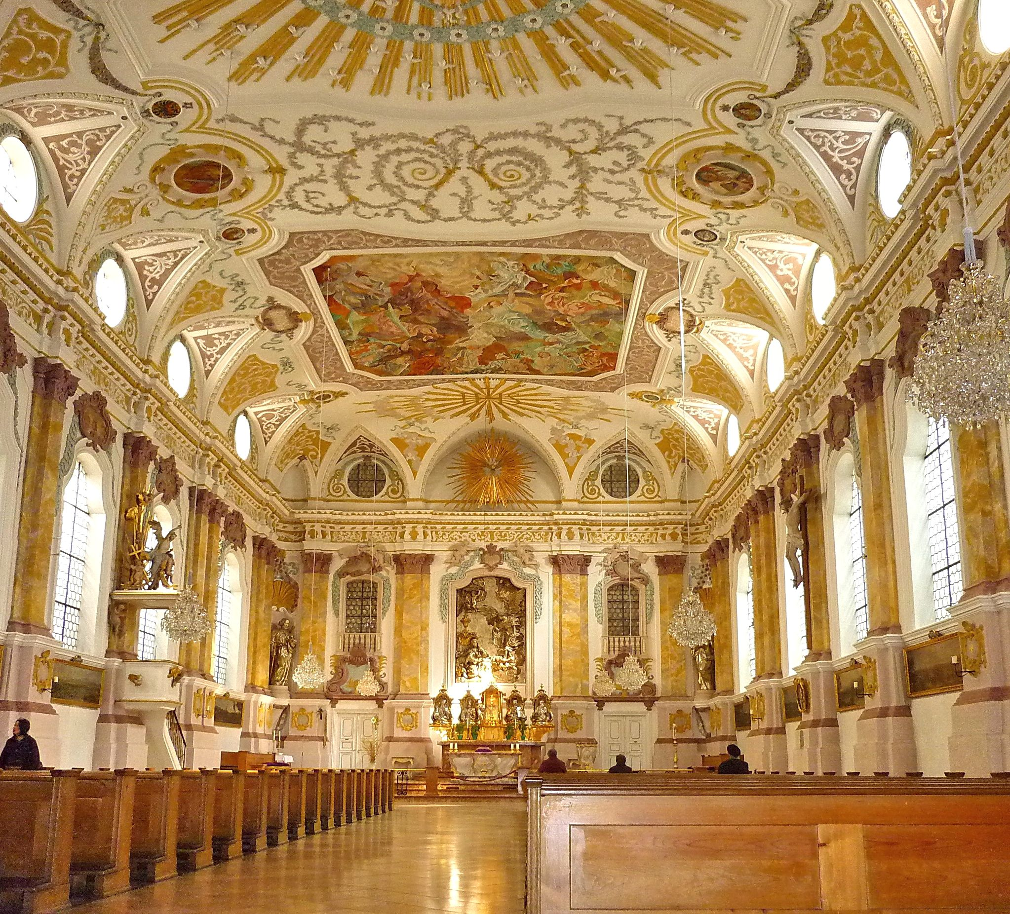 München, Bürgersaalkirche This is a photograph of an architectural monument.